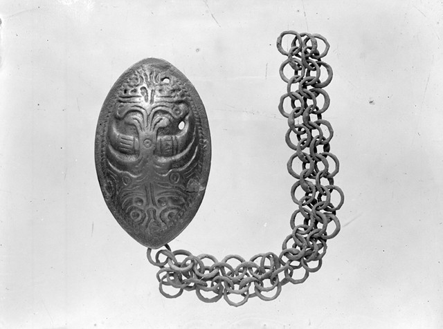 Mikkelistä löytynyt rautakaudelle ajoittuva niin sanottu Karjalainen kupurasolki (KM10862:66) kannatinketjuineen.